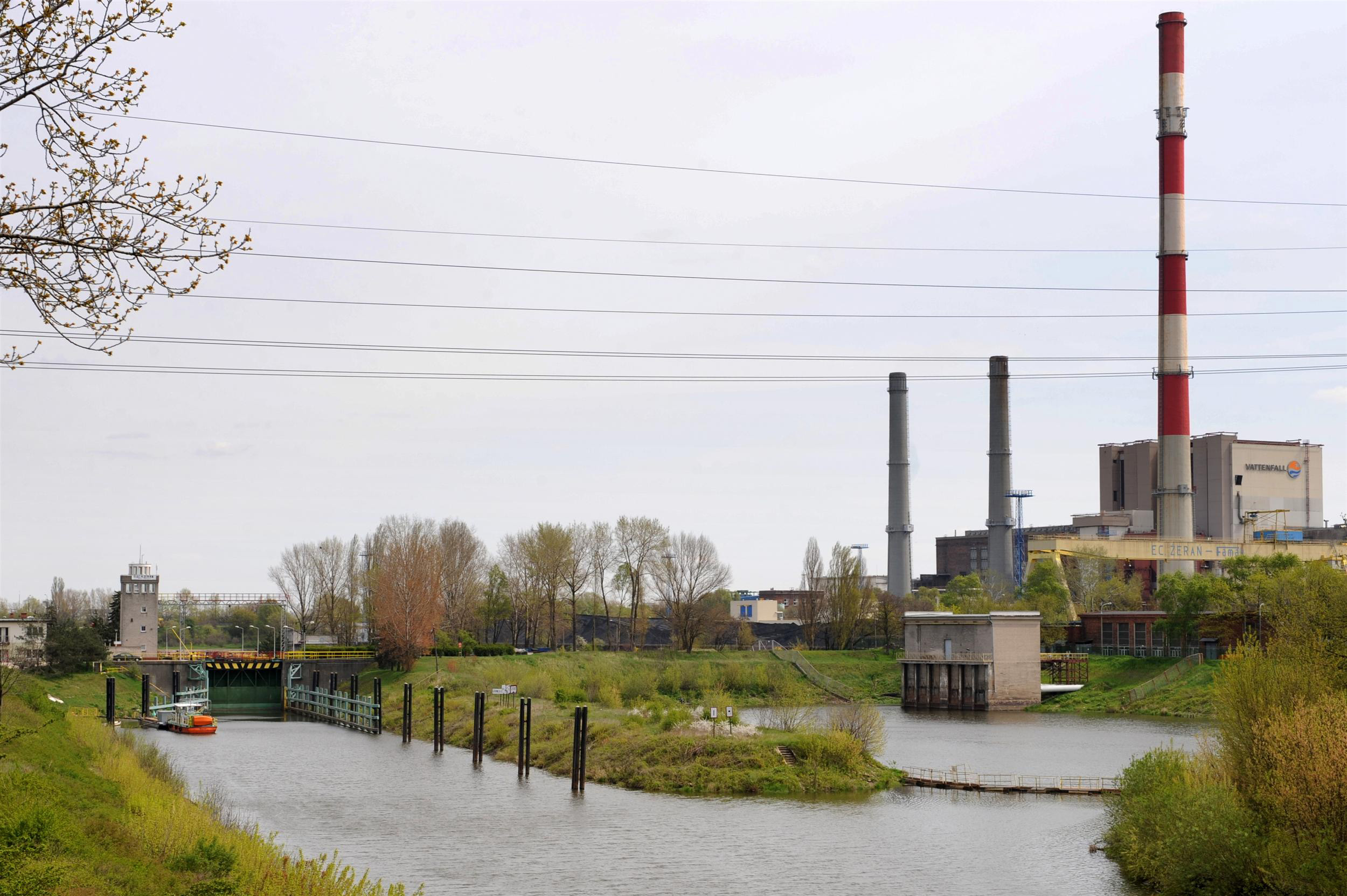 Śluza Żerańska, po prawej Elektrociepłownia Żerań